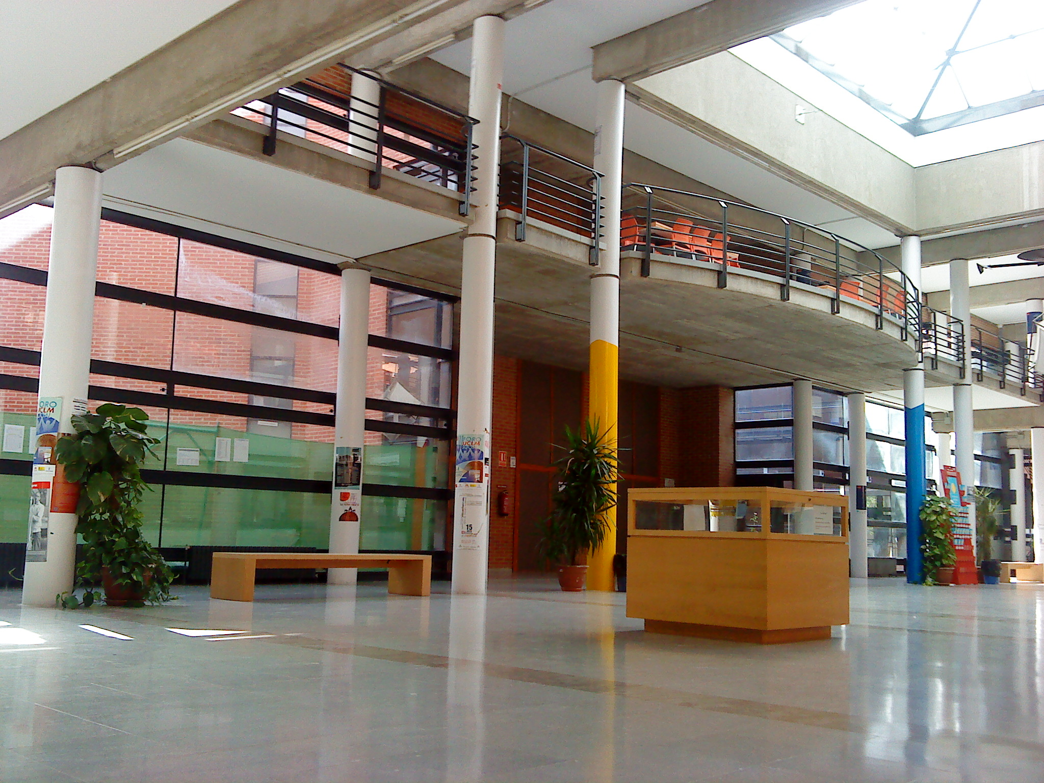 Interior de la Facultad de Relaciones Laborales de la Universidad de Castilla-La Mancha en Albacete